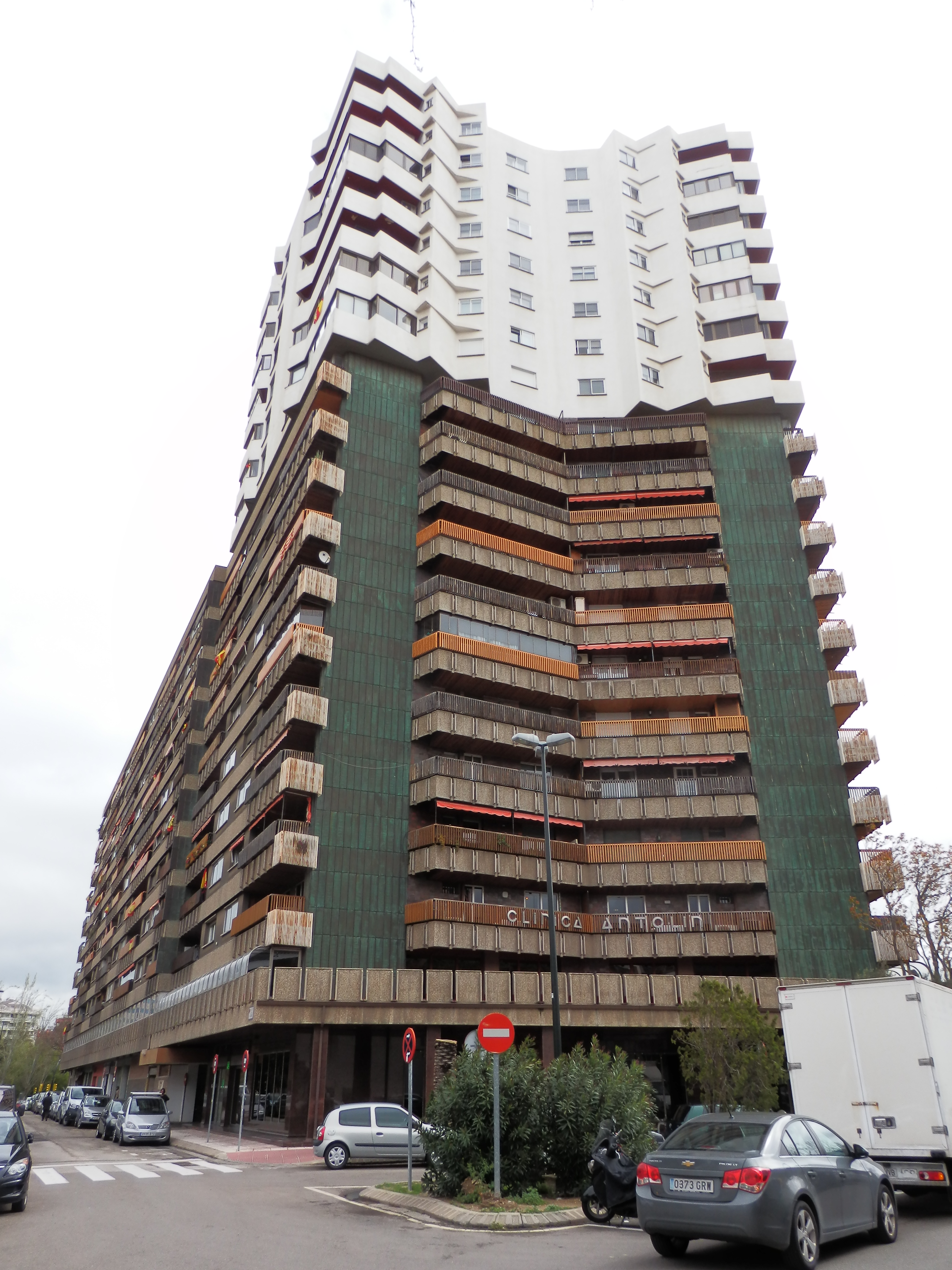 Edificio Hábitat Don 2000 en Zaragoza.